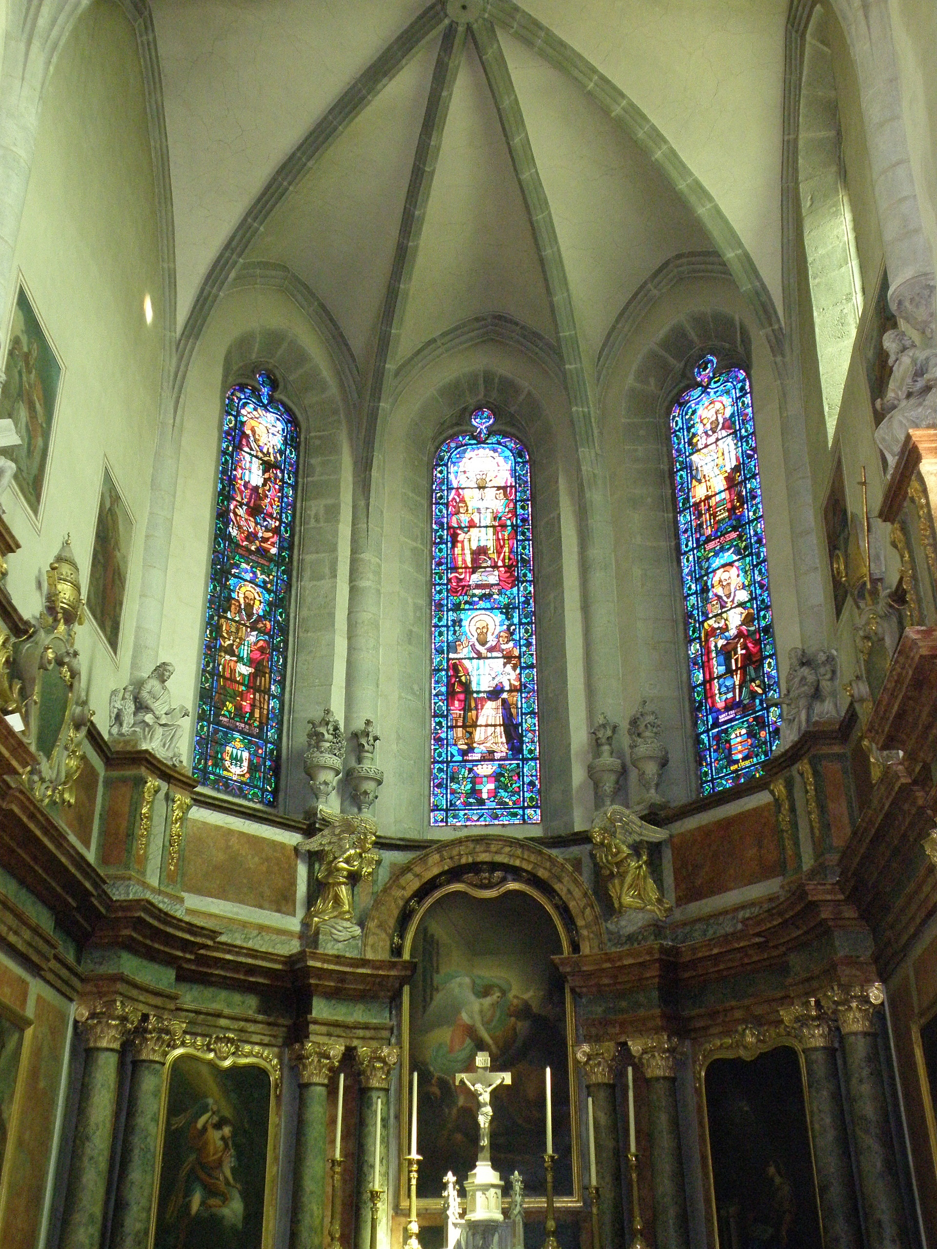 Annecy, ville et préfecture du département de la Haute-Savoie (région Rhône-Alpes, France). Cathédrale Saint-Pierre.